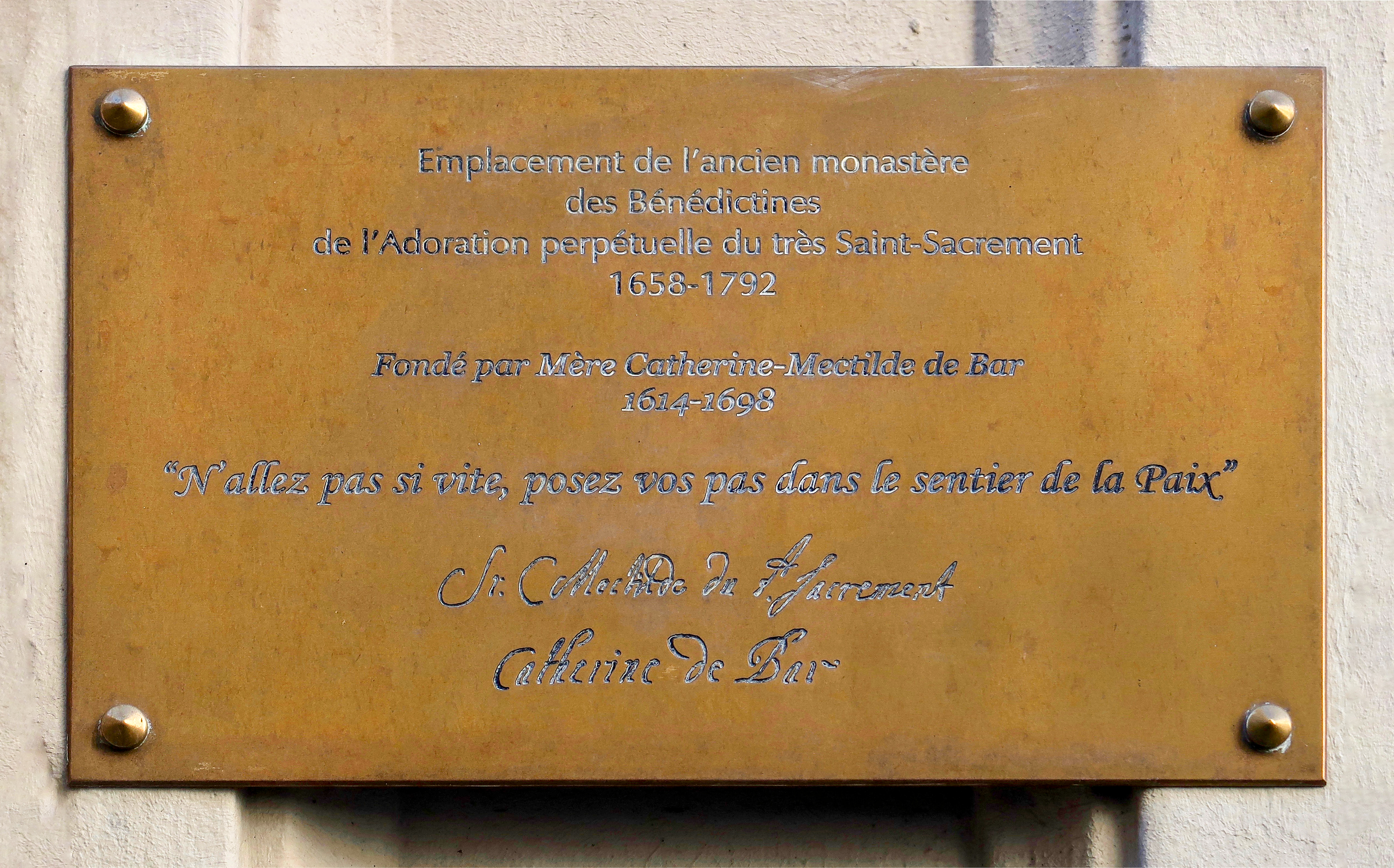 Plaque en hommage au monastère des Bénédictines fondé par Catherine de Bar, 10 rue Cassette (Paris 6e).